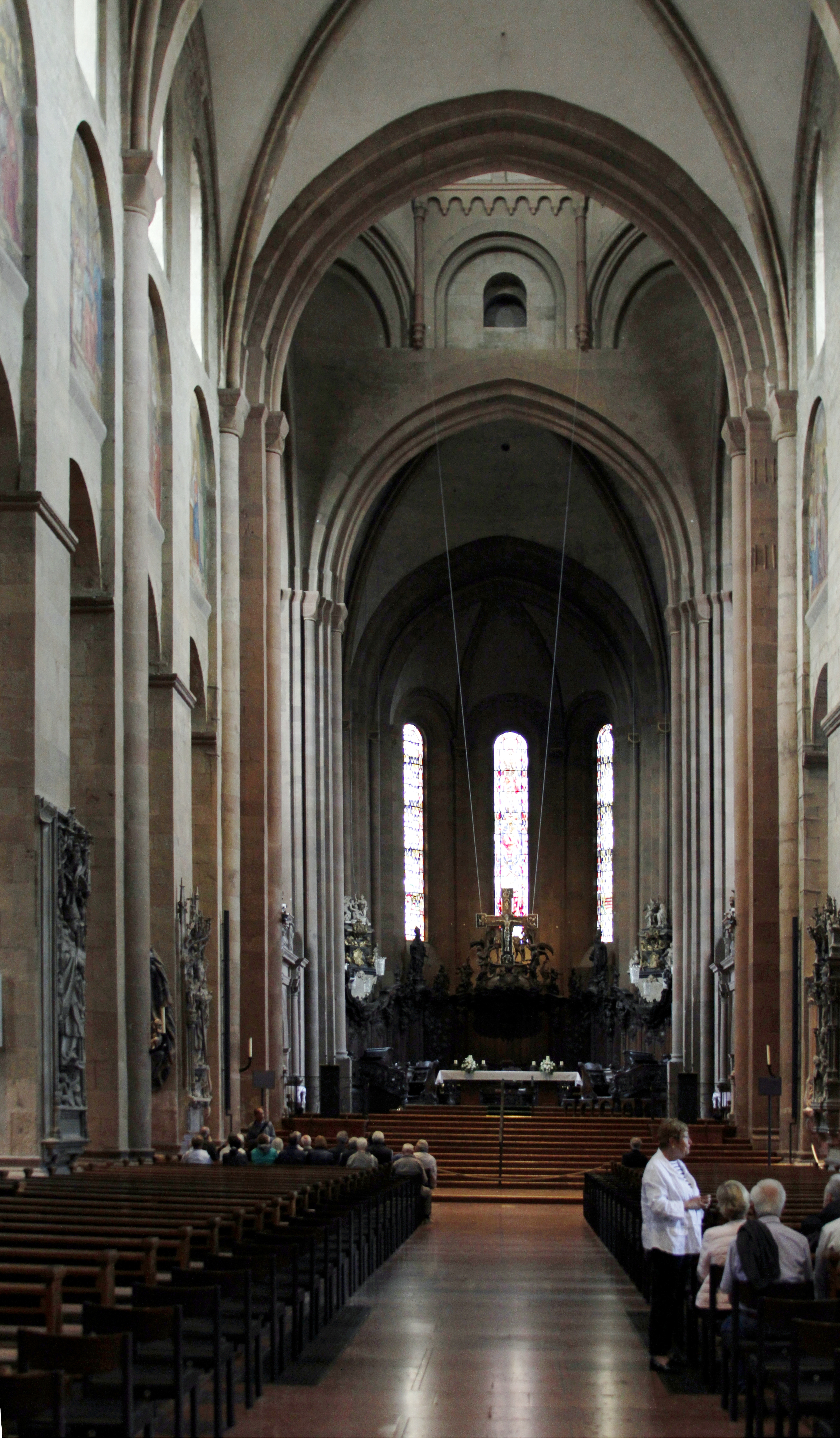 Mainz Cathedral - Mainz - Germany